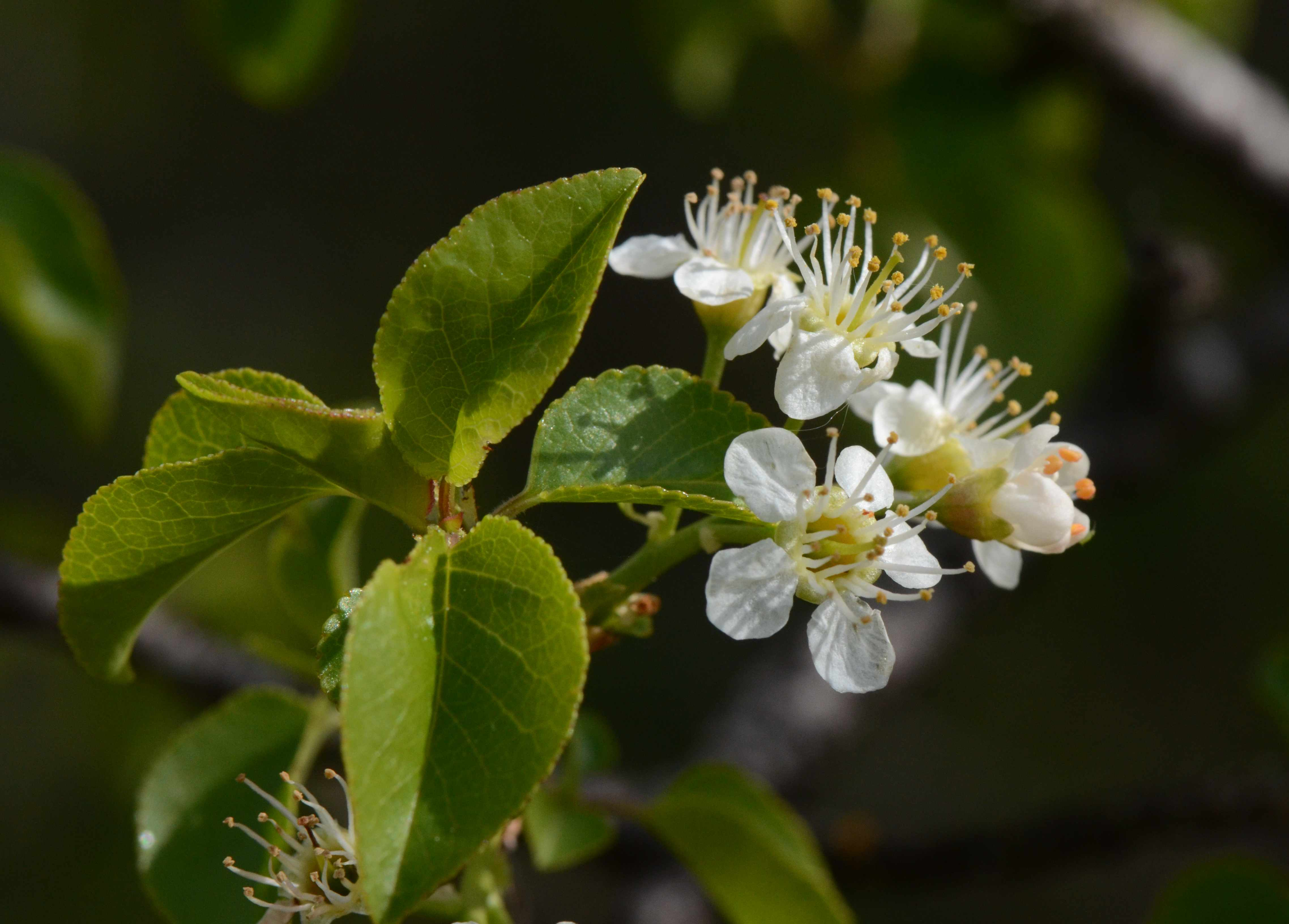 Prunus mahaleb, St-Même-les-Carrières (Charente)